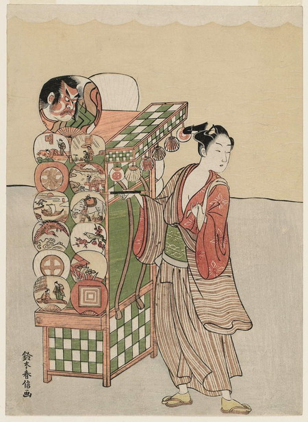 Young Man Selling Fans by Harunobu.jpg (Харунобу Судзукі. Юнак японець продає віяла )